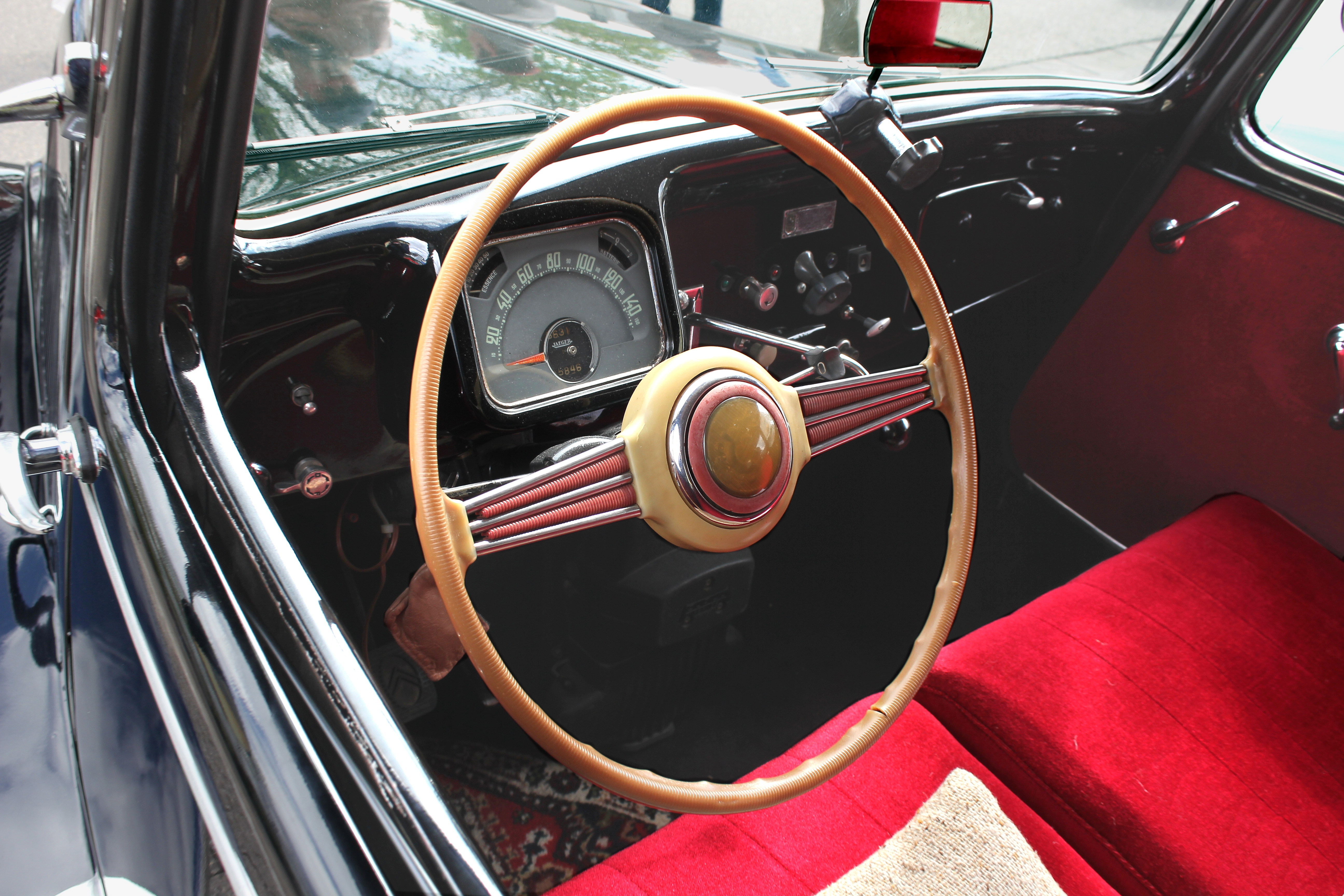 Citroën Traction Avant 11 CV Commerciale, Baujahr 1954, fiktives Kennzeichen